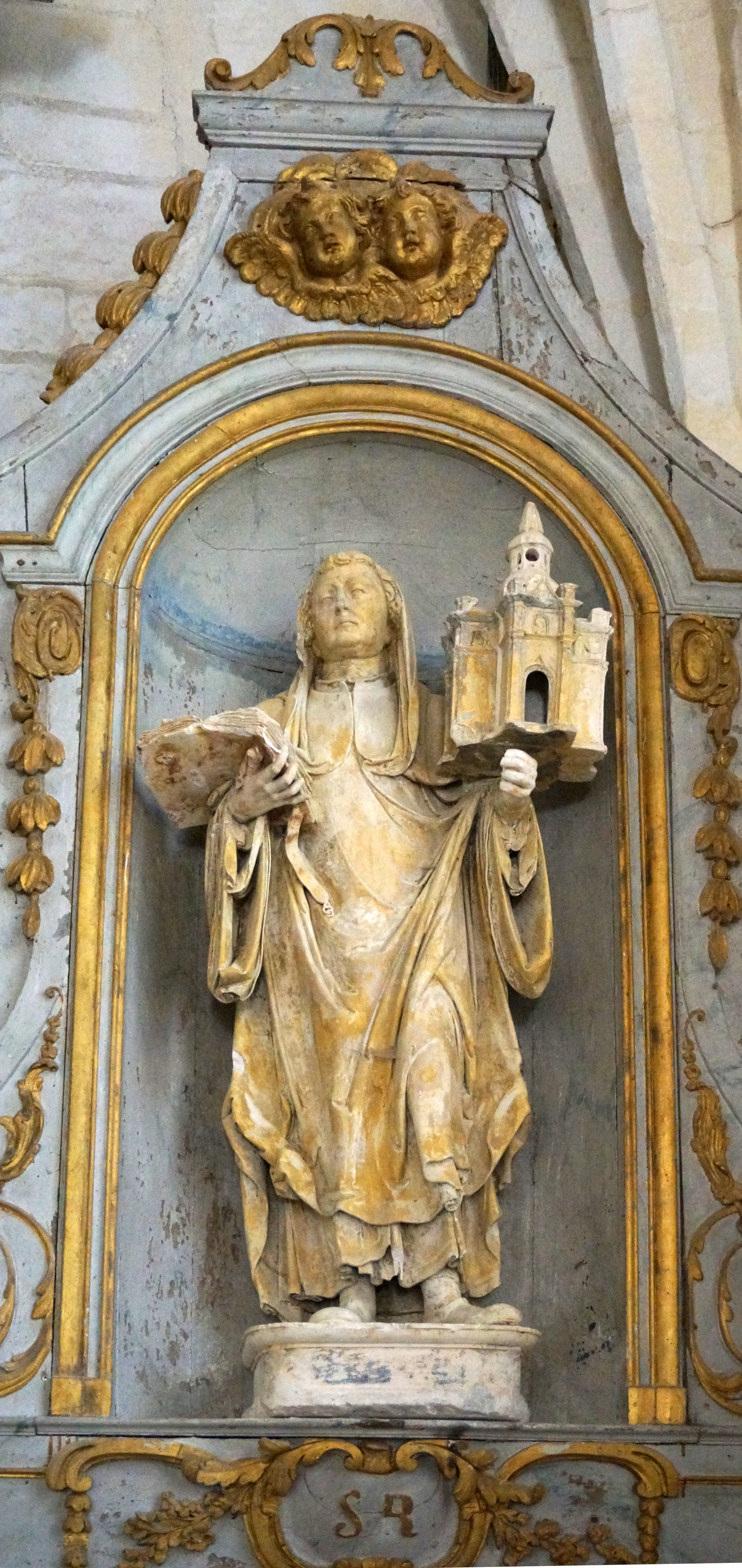 vue de l'Église aux trois sanctuaires.